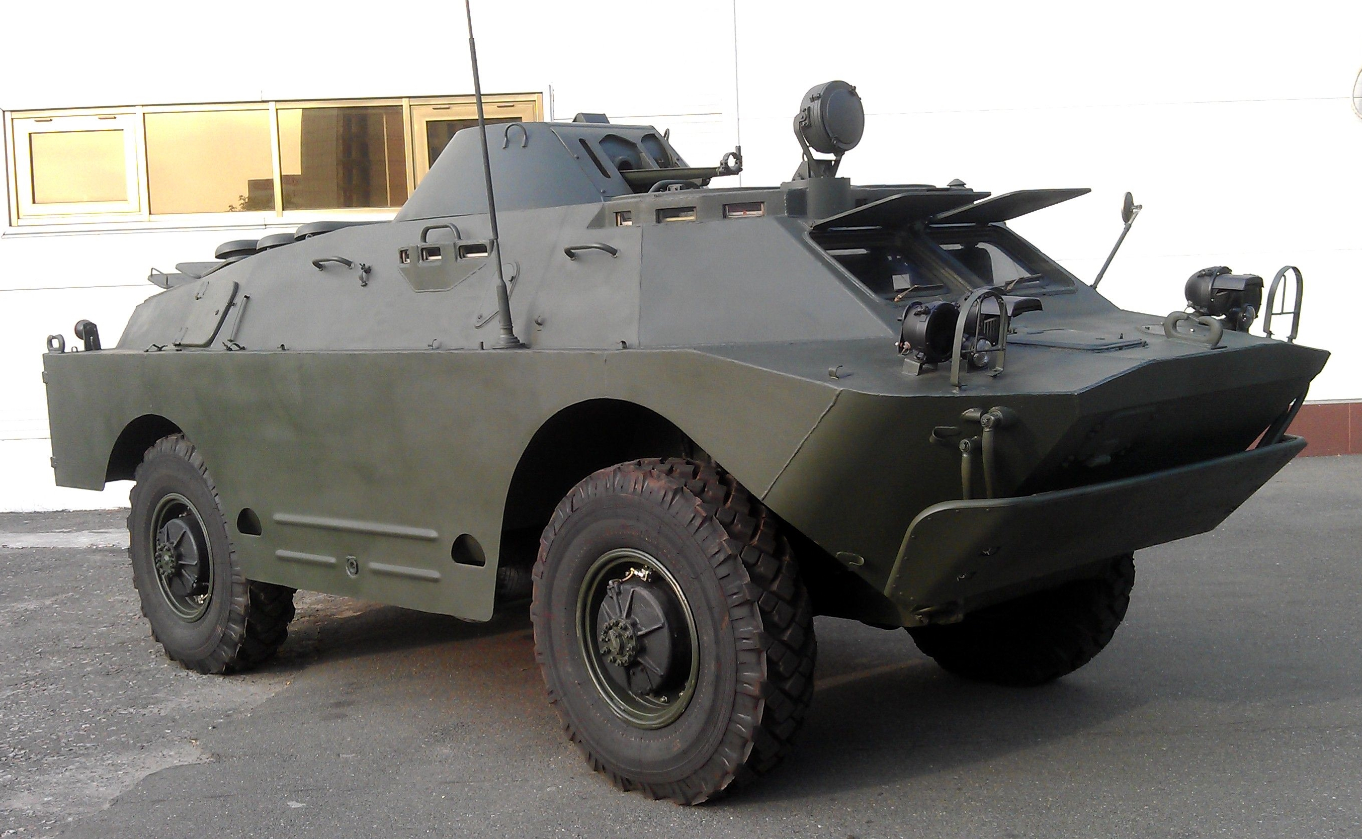 БРДМ-2, оснащенный дизельным двигателем ISUZU и системой централизованной подкачки шин украинского производства, в экспозиции 45-го экспериментального механического завода. Выставка "Зброя та безпека", Киев, сентябрь 2015 г.